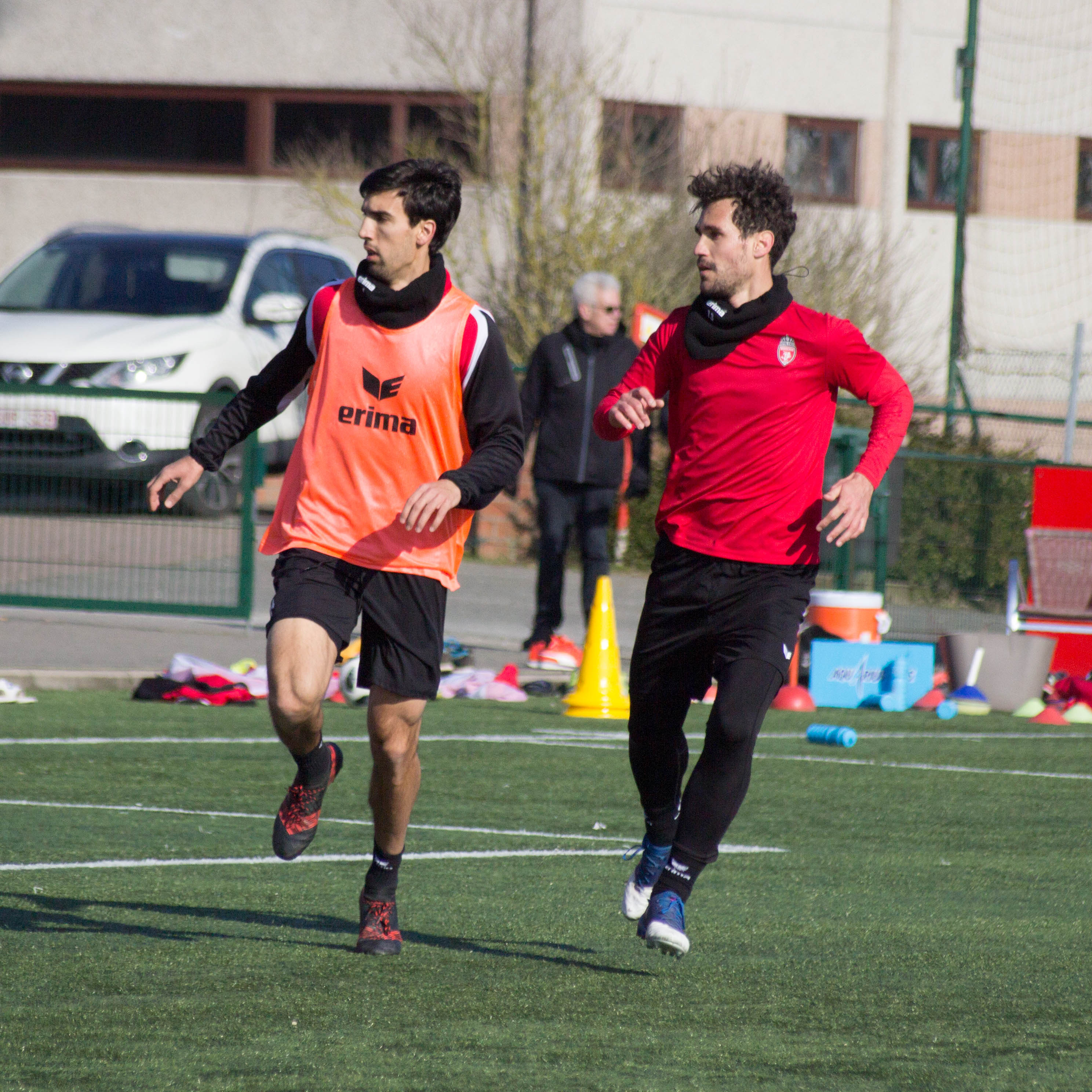 Entrainement du Royal Excel Mouscron, Futurosport, Mouscron. Le 22 Février 2018.